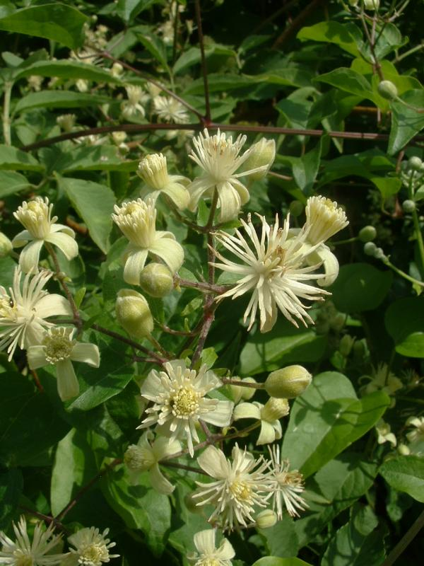 Clématite des haies, Esprels